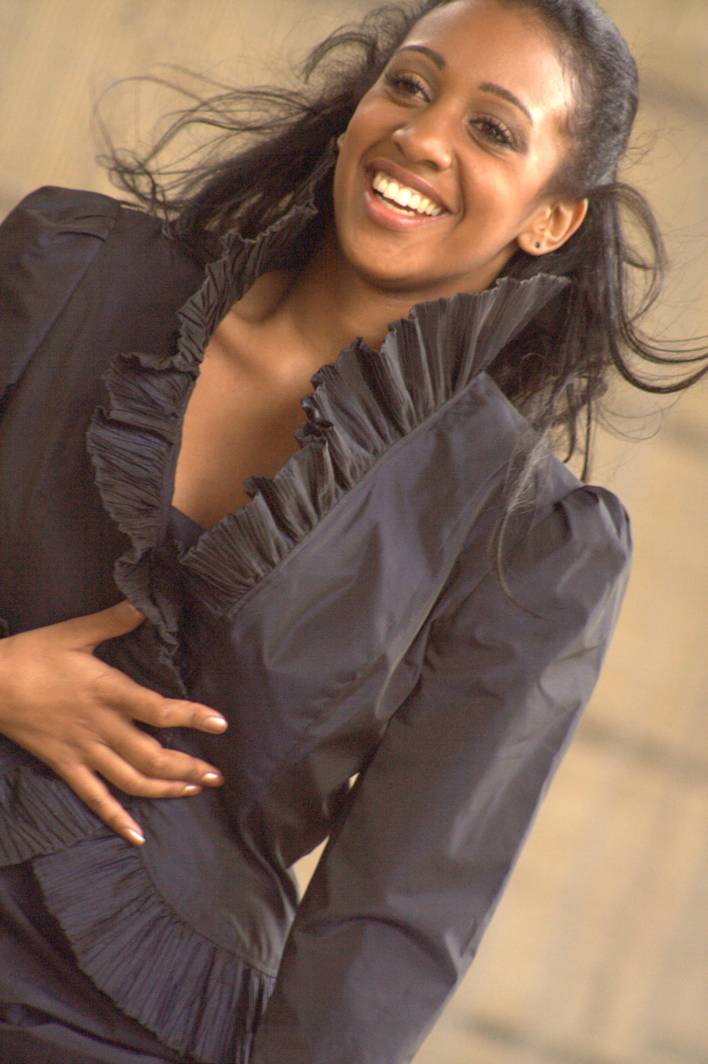 Kamara Bacchus